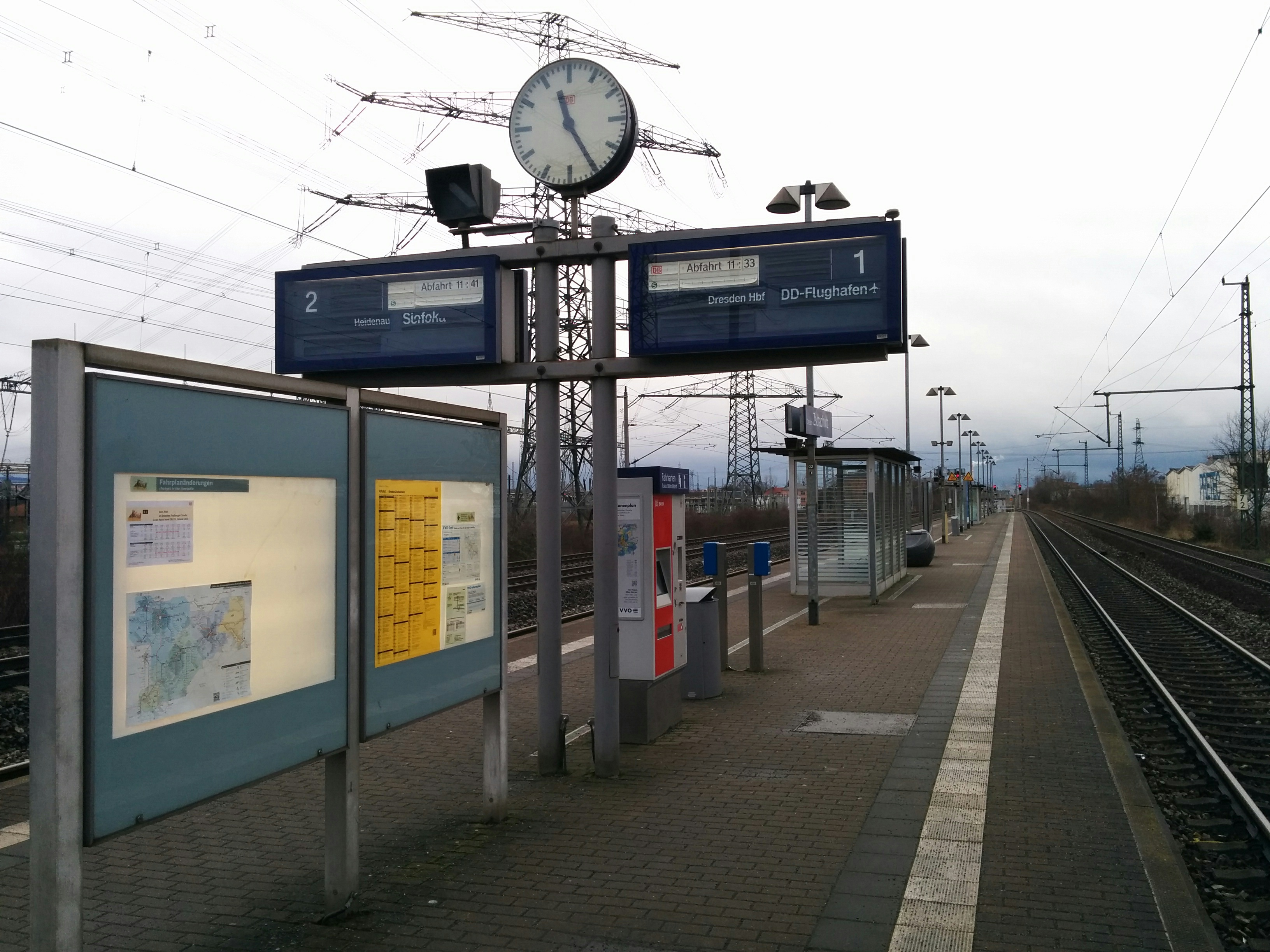 Haltepunkt Dresden-Zschachwitz